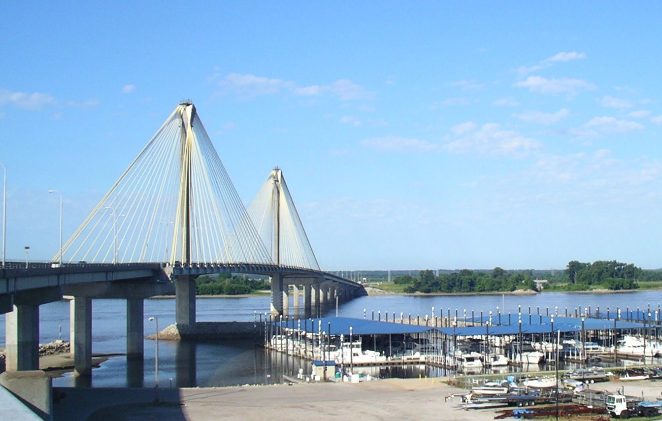 Brücke über den Mississippi von Alton, Illinois nach West Alton, Missouri